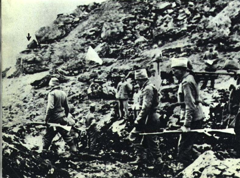 1967-12 1967年10月4日 中印边境冲突后印度领取尸体